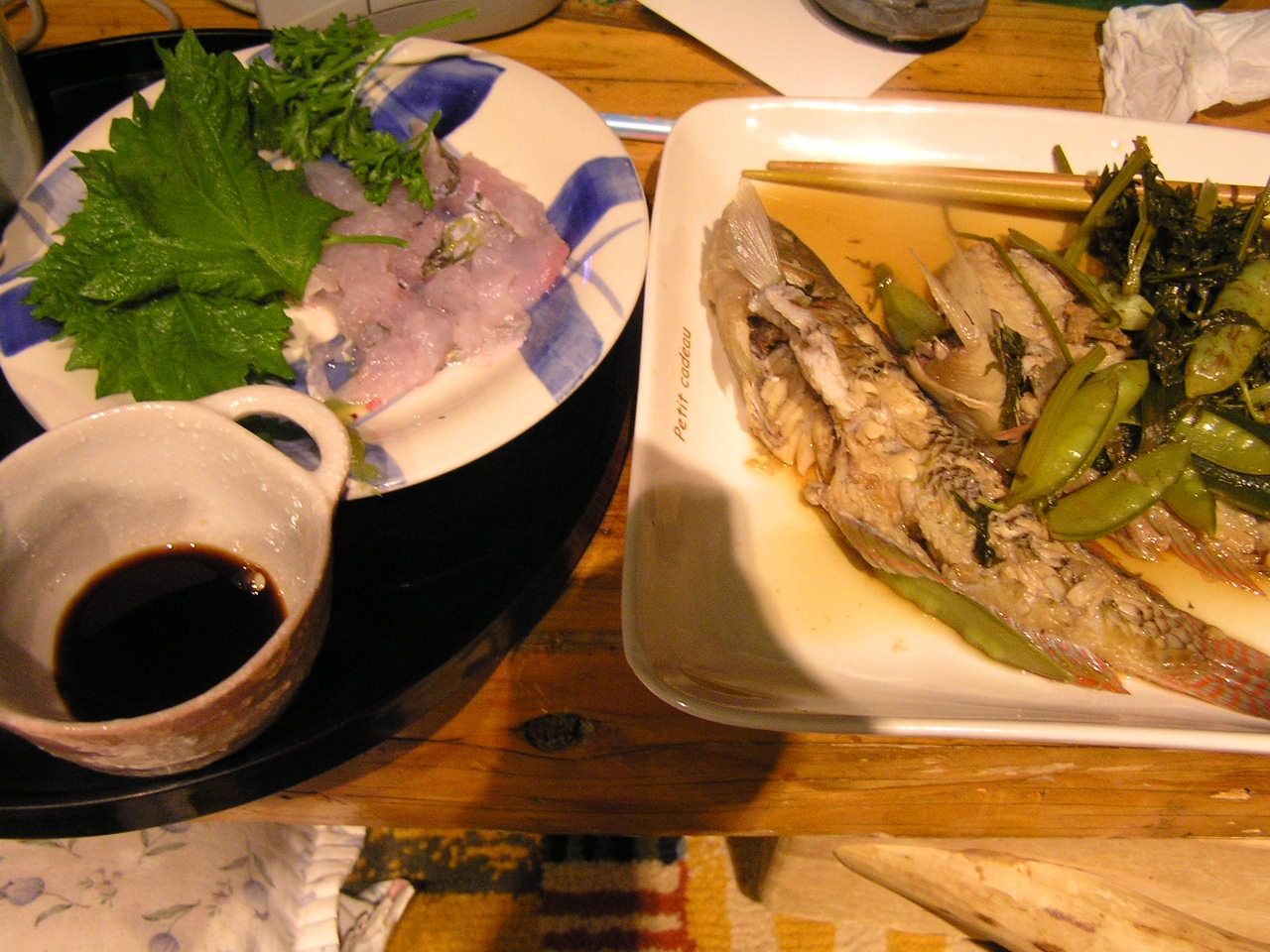 料理されたキュウセン【刺身と煮付け】（スズキ目ベラ亜目ベラ科キュウセン属）